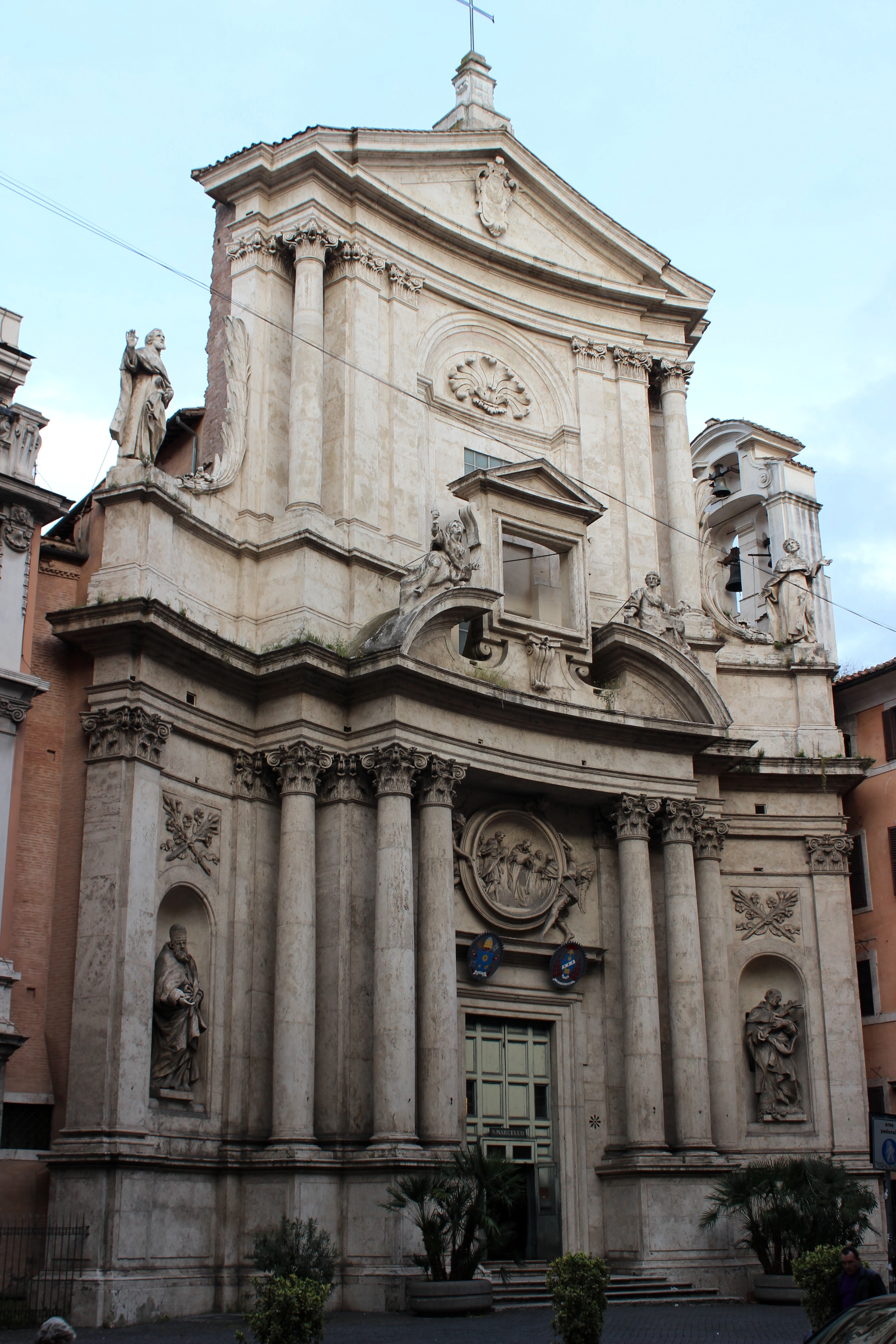 Roma. San Marcello al Corso. Fachada.